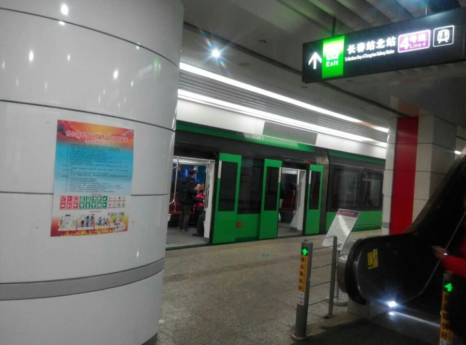 长春轻轨四号线长春站北站